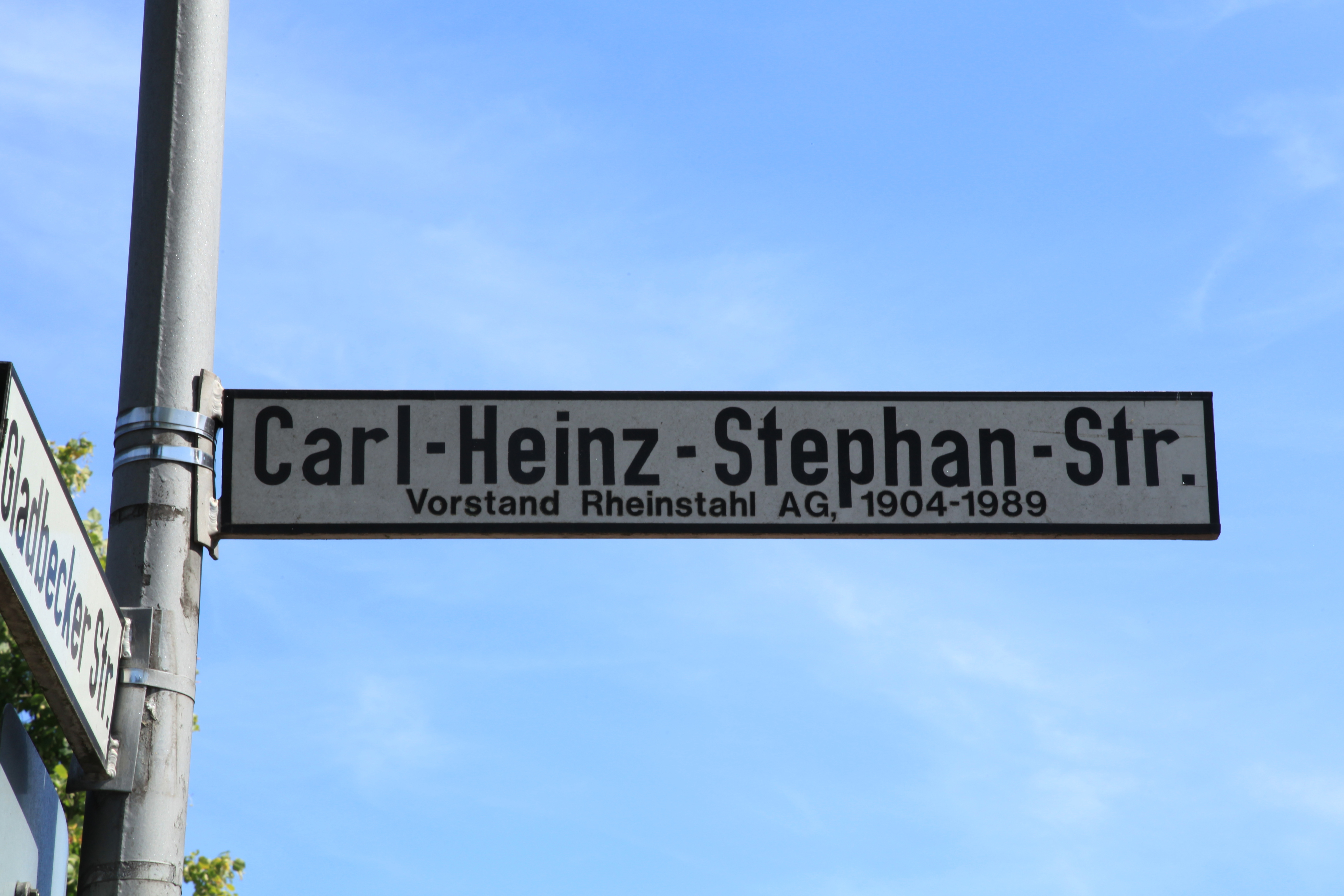 Carl-Heinz-Stephan-Straße, neu angelegte Straße auf dem ehemaligen Gelände der Zeche Prosper III in Bottrop